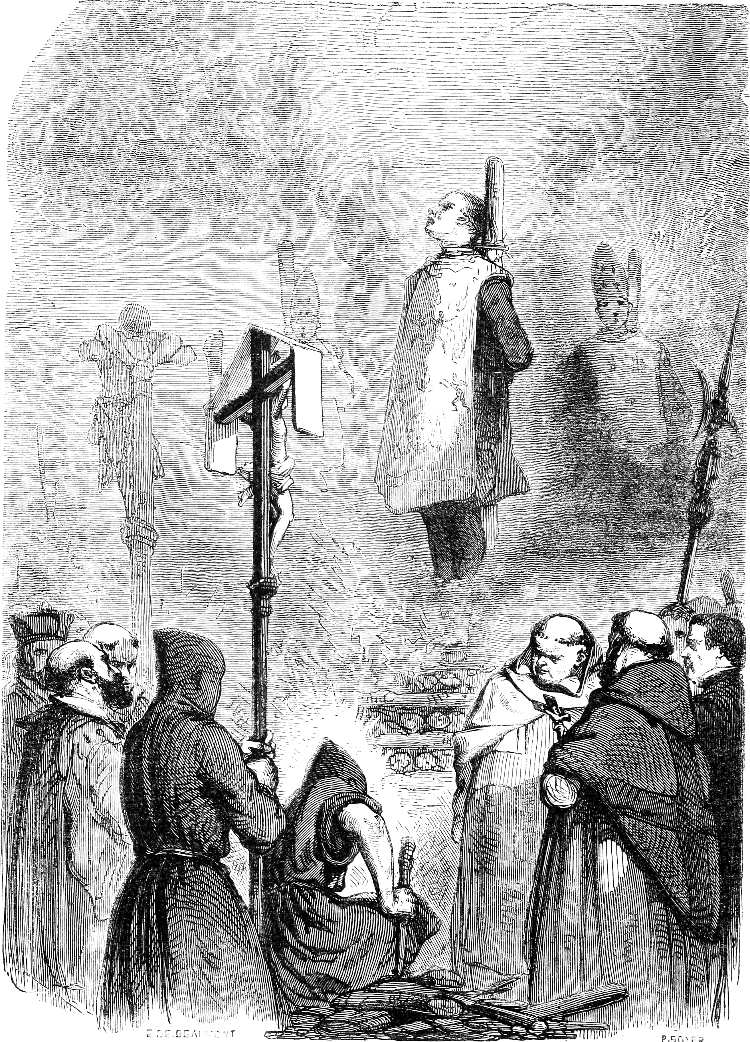 Une illustration pour l’article Inquisition dans le Dictionnaire infernal par Collin de Plancy.